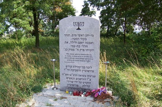 Proszowice - Cmentarz żydowski.